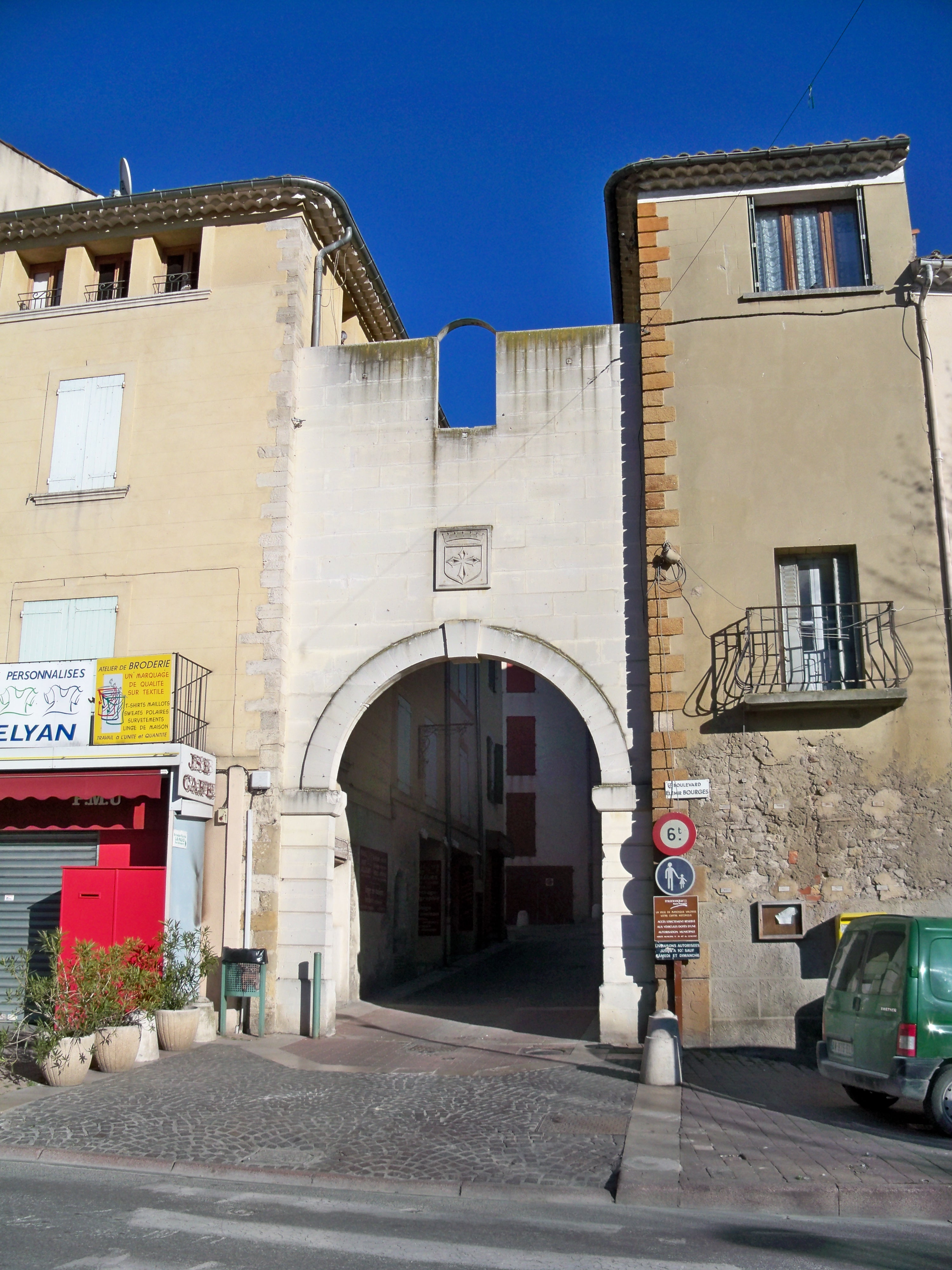 Porte de remparts à Manosque (04), France